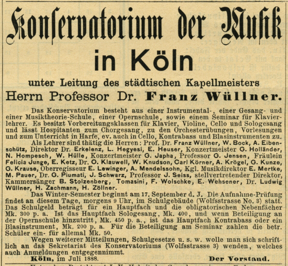 Anzeige mit Angabe der Lehrer vom Juli 1888 (in der Wolfsstrasse No. 3 - nicht 5!)